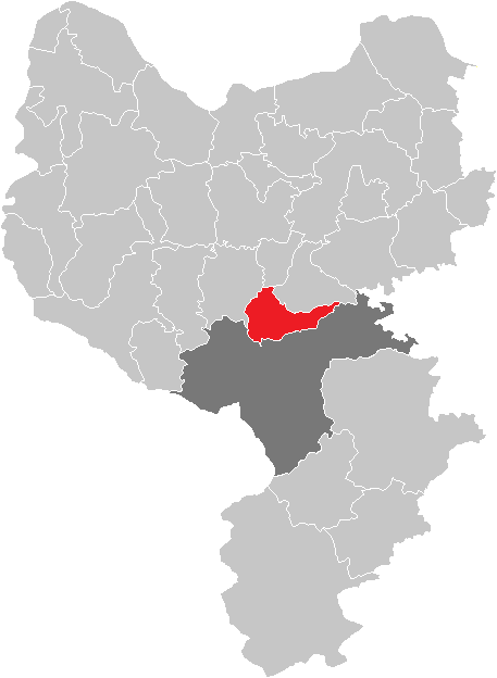 Bezirk Amstetten